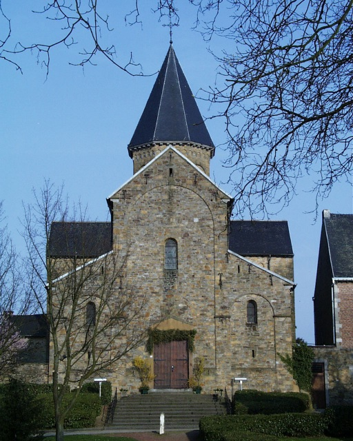 L'église romane de Saint-Séverin-en-Condroz Photo personnelle J. THURION - 1999